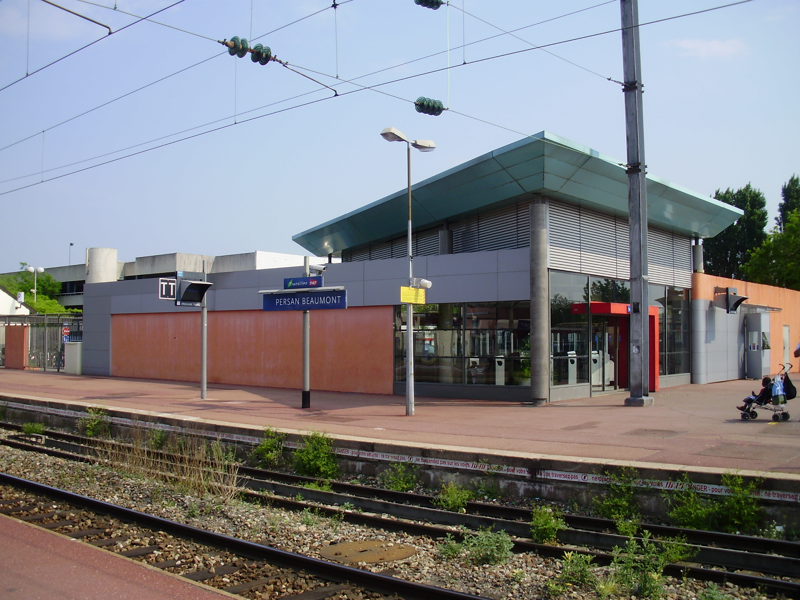 Gare de Persan - Beaumont, à Persan, Val-d'Oise, France : bâtiment voyageurs vu depuis l'un des quais